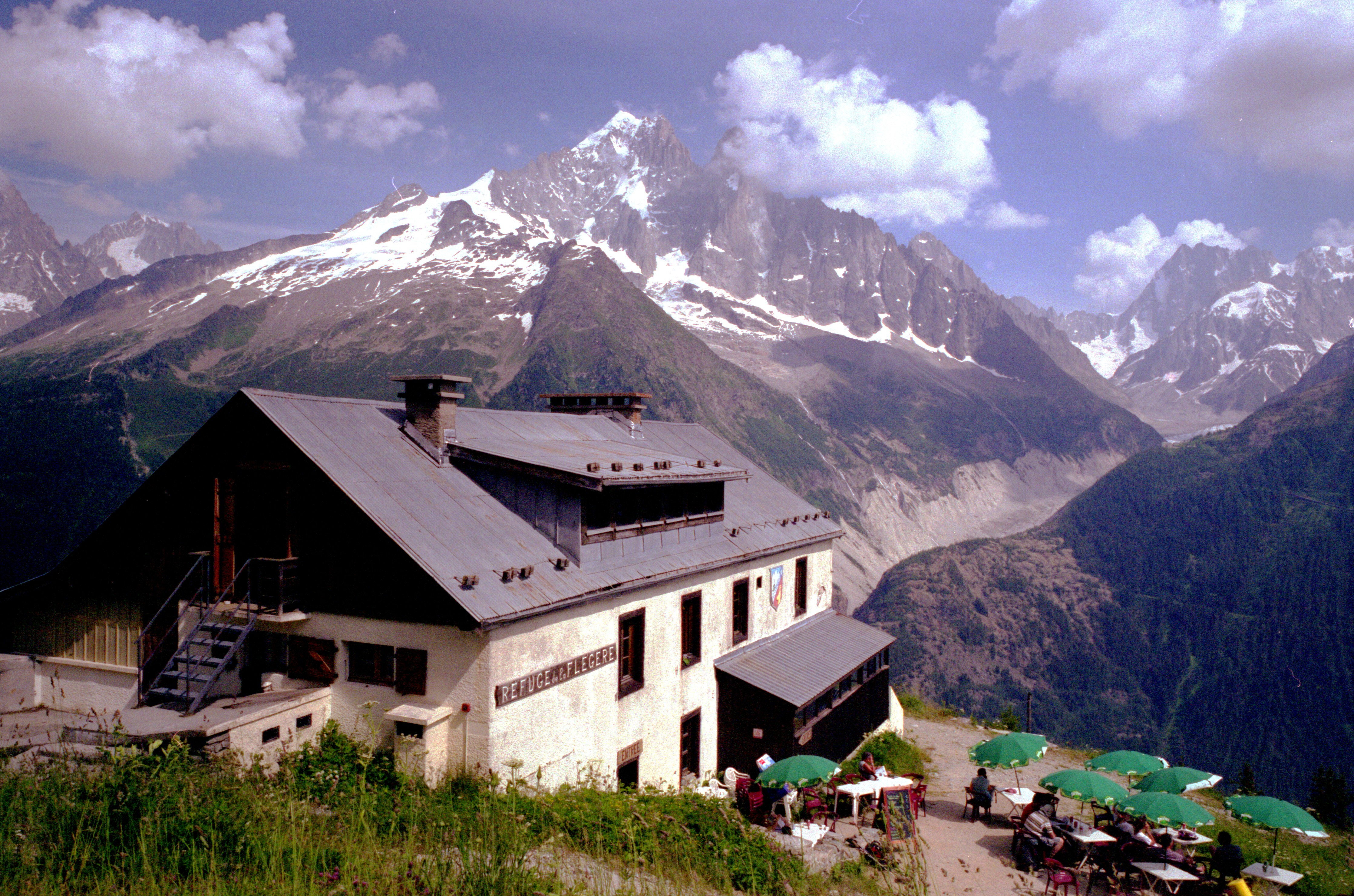 Refuge de la Flégère. En fond, l'Aiguille Verte.